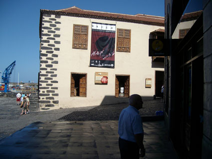 El Museo de Arte Contemporáneo Eduardo Westerdahl –MACEW- tiene su sede en la Casa de la Aduana, de Puerto de la Cruz, isla de Tenerife (Canarias). El titular de la colección de arte, parte de la cual se muestra de modo permanente y con carácter rotatorio –cada año se lleva a cabo un cambio de los fondos artísticos expuestos- es el Instituto de Estudios Hispánicos de Canarias, que tiene su sede en la calle Quintana, de Puerto de la Cruz, isla de Tenerife (Canarias). Entre 1953, año de la fundación del Instituto, y 1965, Eduardo Westerdahl desempeñó la responsabilidad de la Sección de Arte del Instituto, y junto con su mujer Maud Bonneaud, su amigo el pintor surrealista Oscar Domínguez, el arquitecto suizo Alberto Sartoris y su mujer, Carla Prina, así como el apoyo de otros destacados intelectuales y artistas, como Ángel Ferrant, Manolo Millares y César Manrique, llevó adelante un gran proyecto: formar una colección de arte de primer nivel y emprender las gestiones necesarias para dotarla de una sede permanente. Entre los autores presentes en la colección podemos citar a: Óscar Domínguez, Juan Ismael, Wolfgang Paalen, Vizcondesa de Noailles, Eileen Agar, Maud Bonneaud, Will Faber, Carla Prina, Tony Stubbing, Luc Peire, Ángel Ferrant, Enric Planasdurá, Eduardo Úrculo, Plácido Fleitas, Manuel Millares, César Manrique, Felo Monzón, Pedro González y Lola Massieu. Después de esta etapa inicial, en las temporadas siguientes múltiples artistas presentaron sus obras en el Instituto de Estudios Hispánicos de Canarias dando lugar, en la actualidad, a un fondo artístico que supera el medio millar de obras. Entre todas ellas, además de los ya citados, figuran igualmente artistas muy destacados no sólo en el ámbito de las islas Canarias, sino también en el panorama artístico de España, como Antoni Tápies y Guinovart, por citar algún artista.